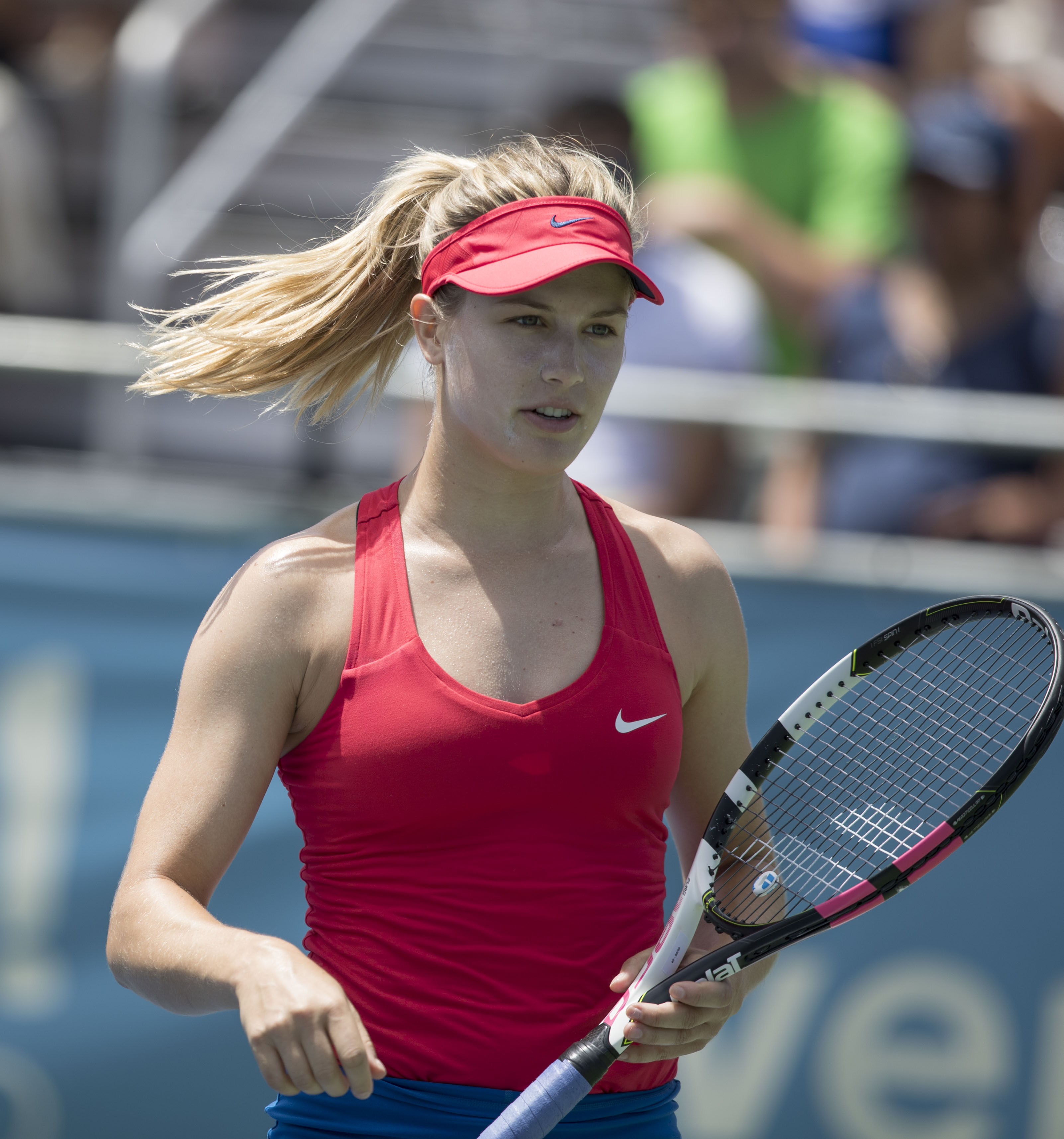 Citi Open Tennis 2017